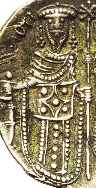 Kaiser Theodor I. Laskaris (1208-1222 Byzanz; Exil-Kaisertum in Nicaea) - Aufnahme von einer Aspron Trachy , Electrum Münze aus Magnesia